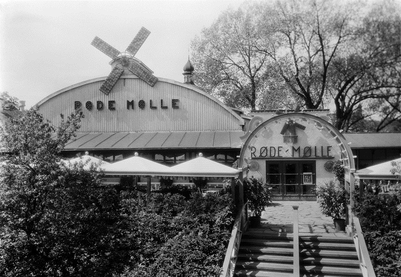 Tivoli, restaurant Røde Mølle, trapp, inngangsparti, parasoller.